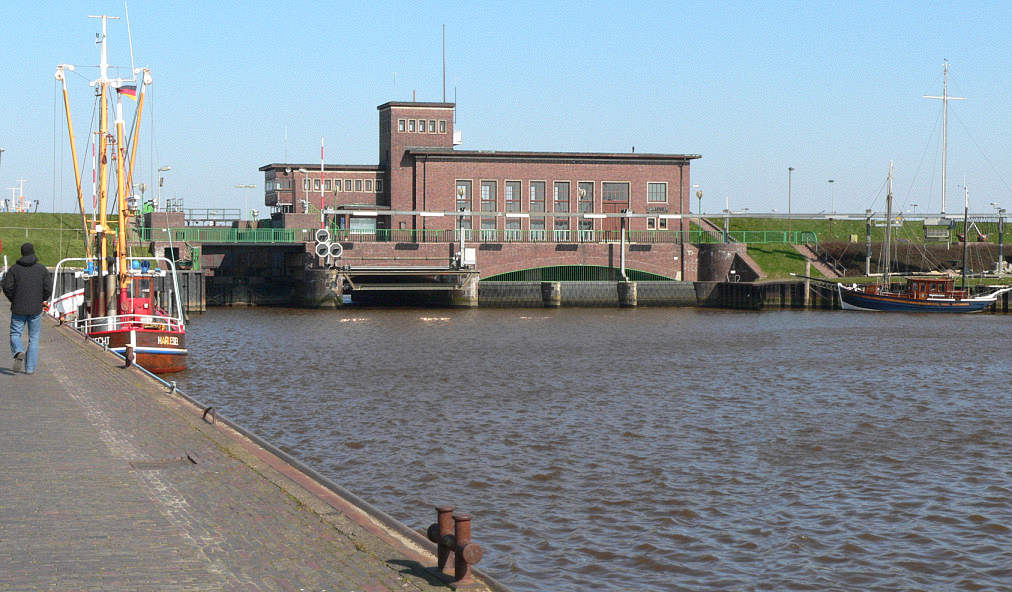 Harlesiel